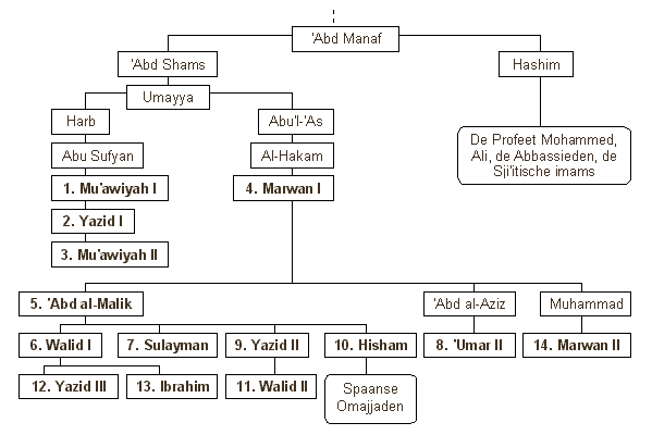 stamboom kaliefen Omajjaden, eigen maaksel